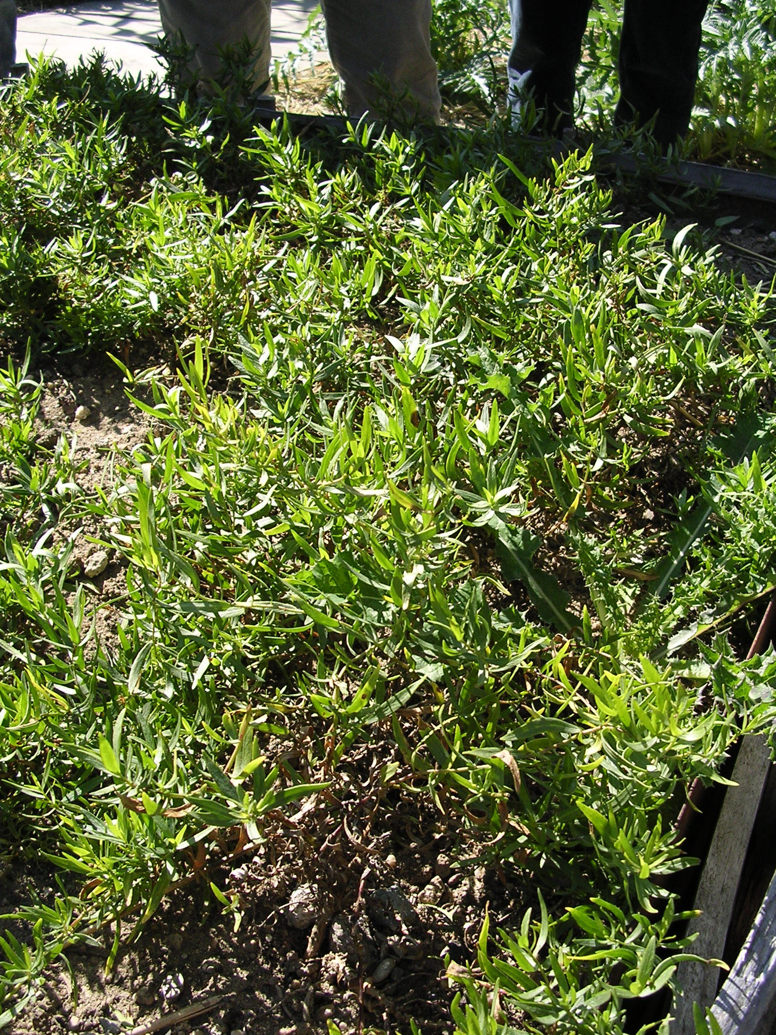 estragon de russie